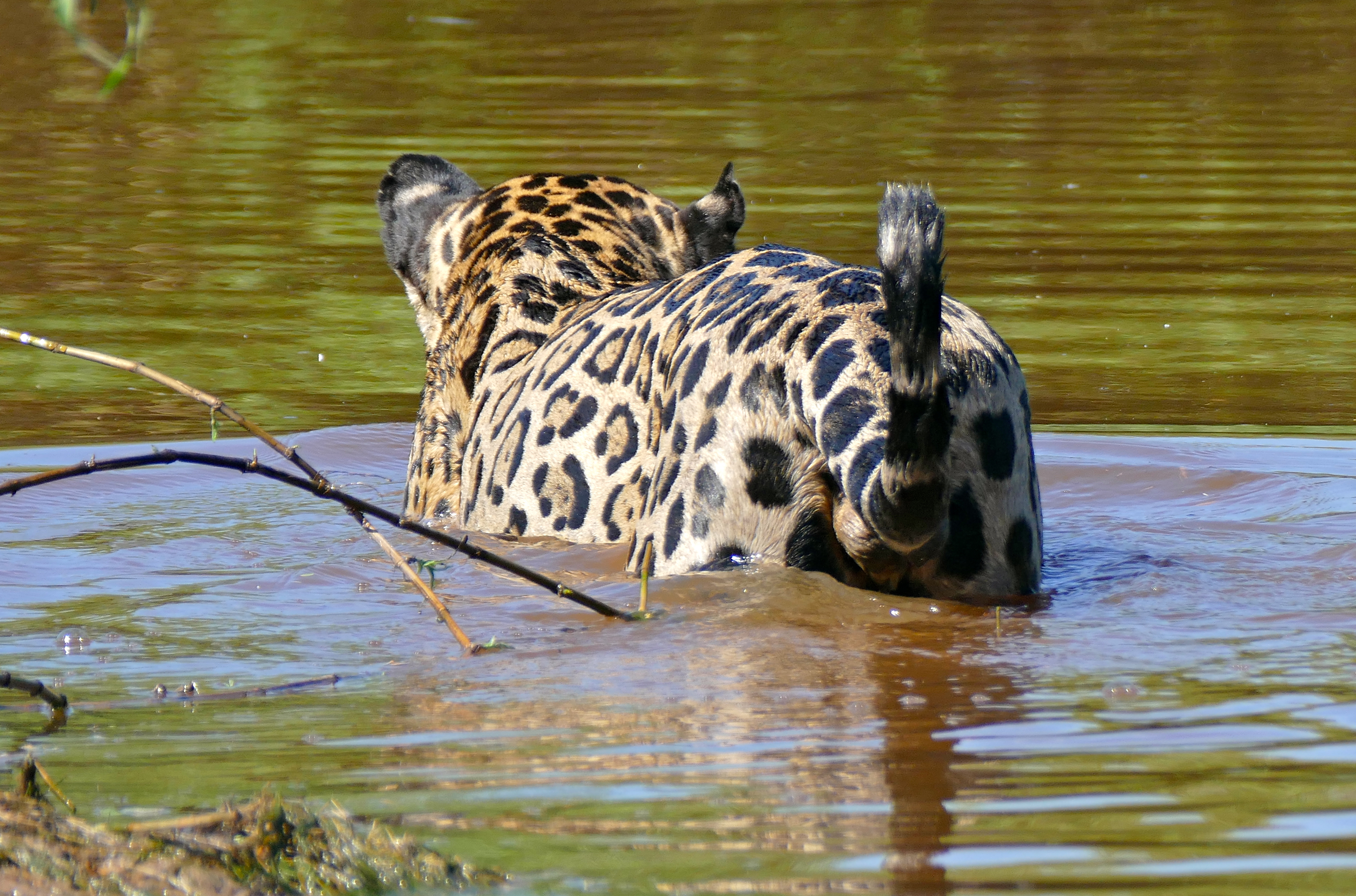 Rio São Lourenço, Porto Jofre, Pantanal, Poconé, Mato Grosso, BRAZIL